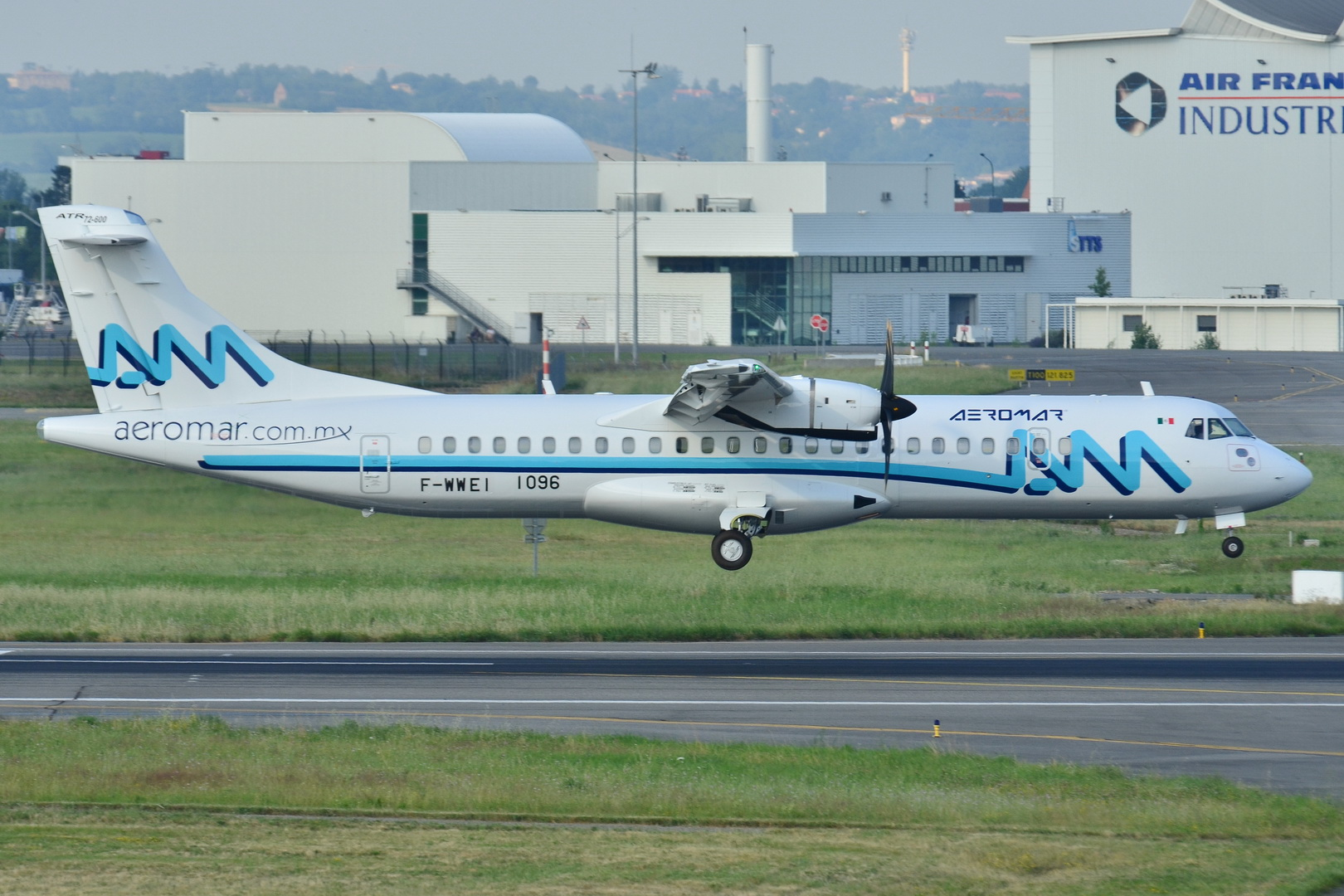 Photo prise à l'aéroport de Toulouse-Blagnac (LFBO) en France. Picture take at Toulouse-Blagnac Airport (LFBO) in France.